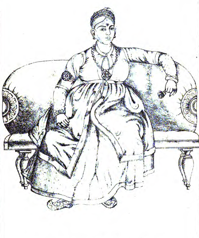 Rajah Rajah Vurmah Koil Thumpuran